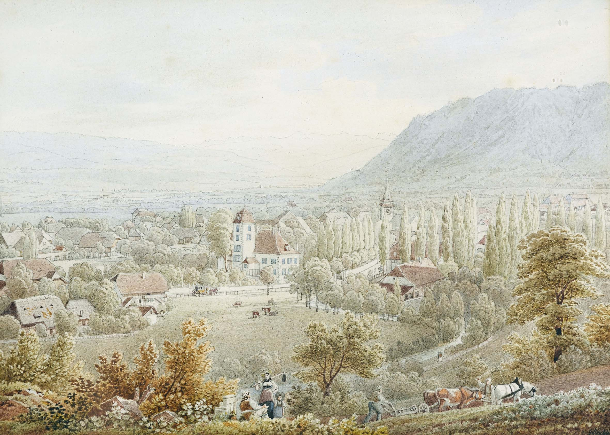 Gabriel Lory fils, Ansicht von Belp, 20 x 27,5 cm